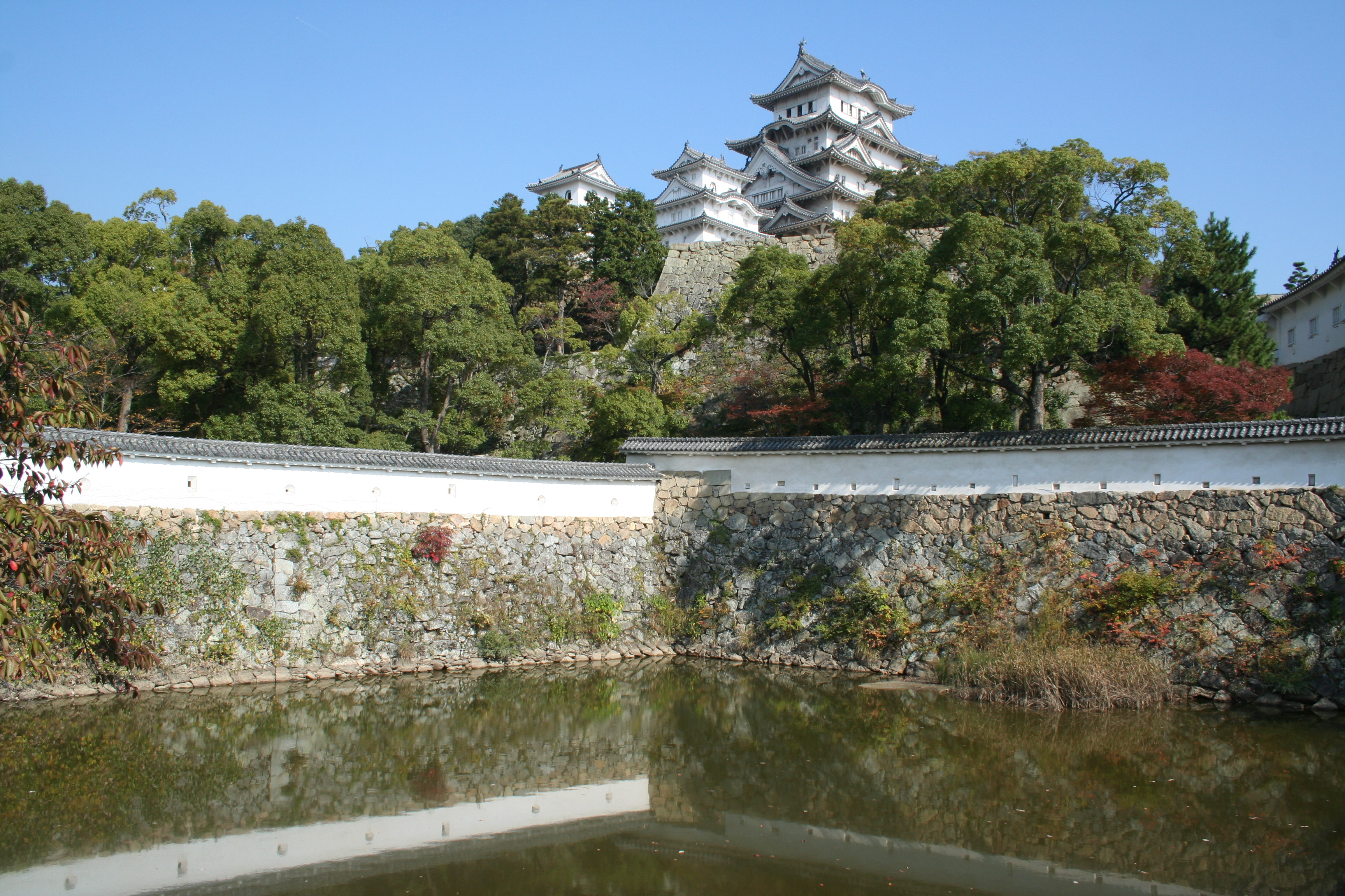 2009年秋の姫路城。 三国掘と天守閣。